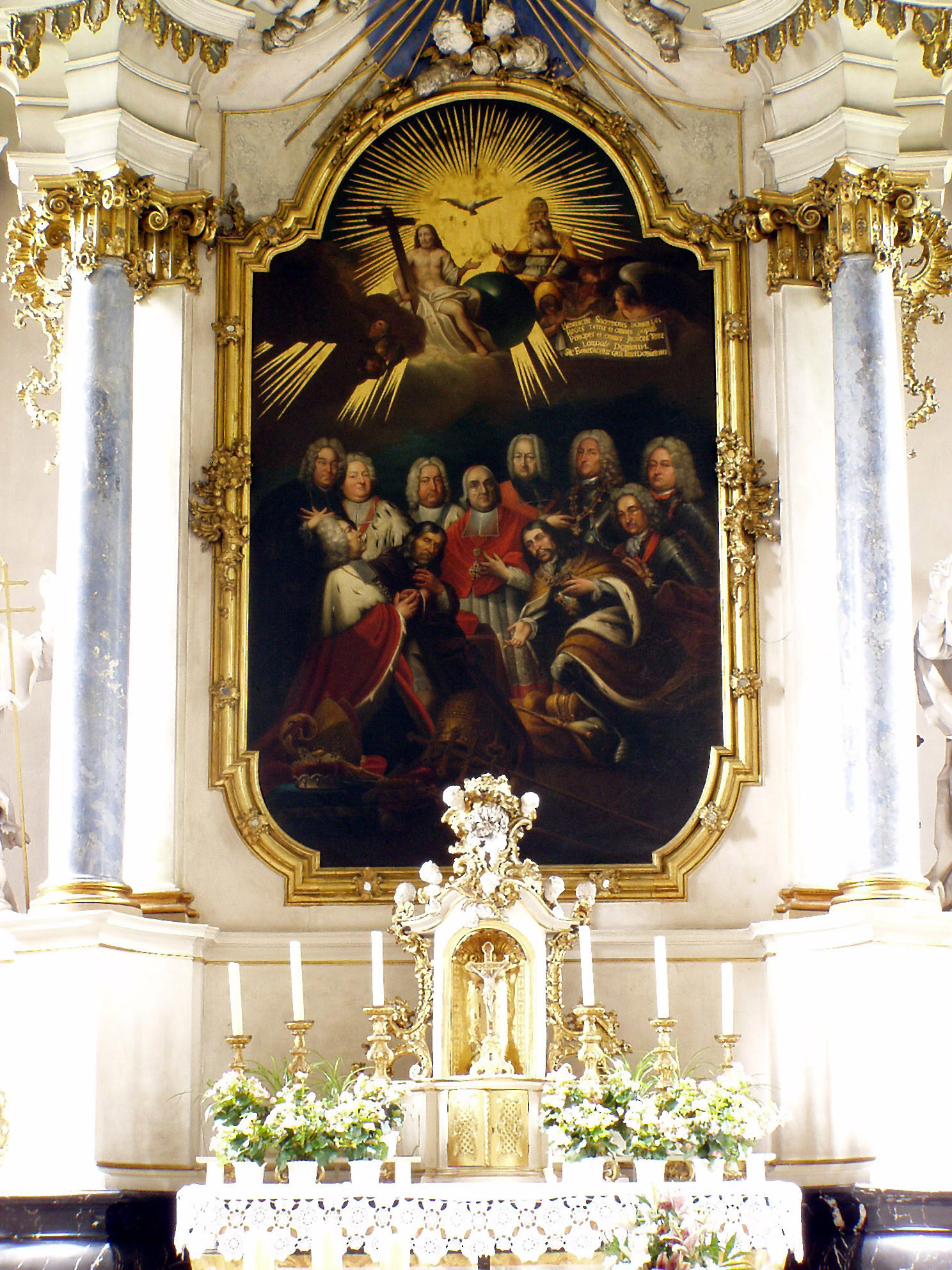 Altarbild Pfarrkirche Gaibach